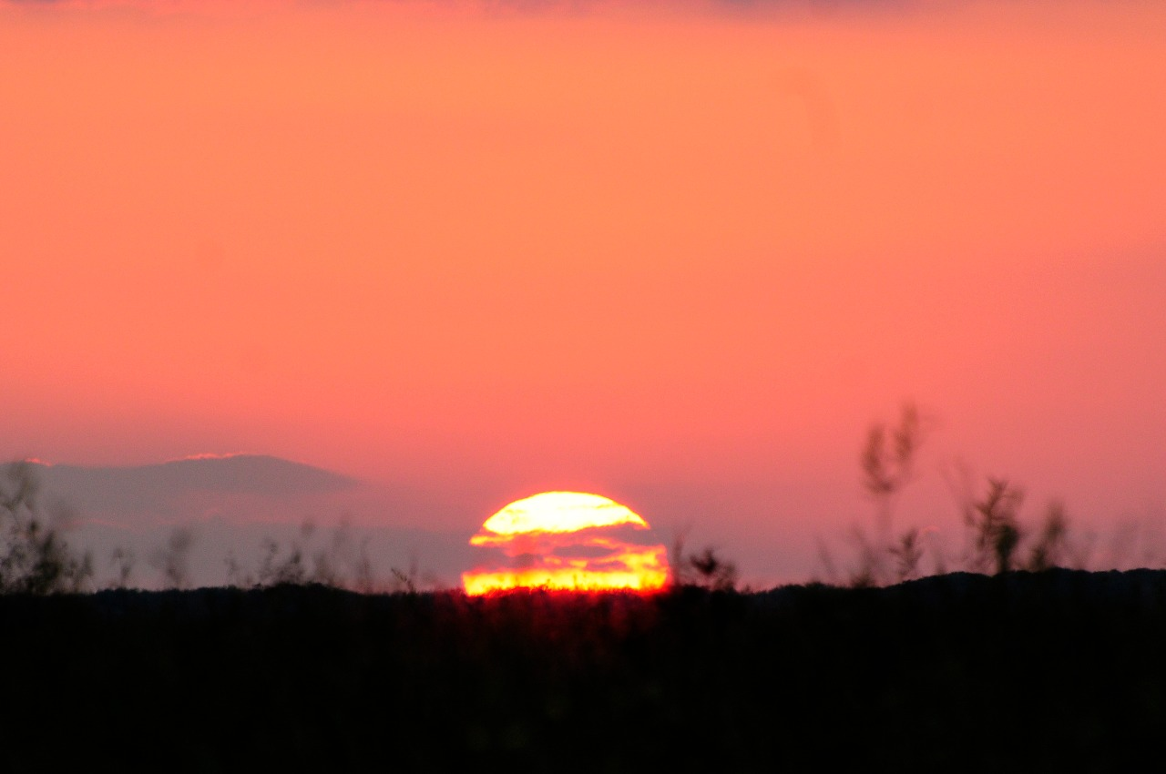 Un atardecer en Yatay Tí Calle. Foto de Norberto Bolzón.